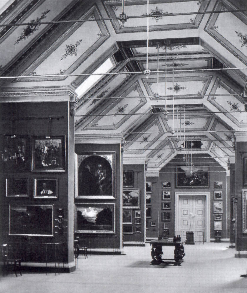 Öffentliche Kunstsammlung Basel: Gemäldegalerie im Oberlichtstaal des Museums an der Augustinergasse. Die Decken sind mit Malereien reich ausgestattet und mit Zugstangen der Hängewerke versehen. Diese gingen 1928 durch den Neubau des Dachstocks verloren. Fotografie von Jakob Höflinger, vor 1862/66.